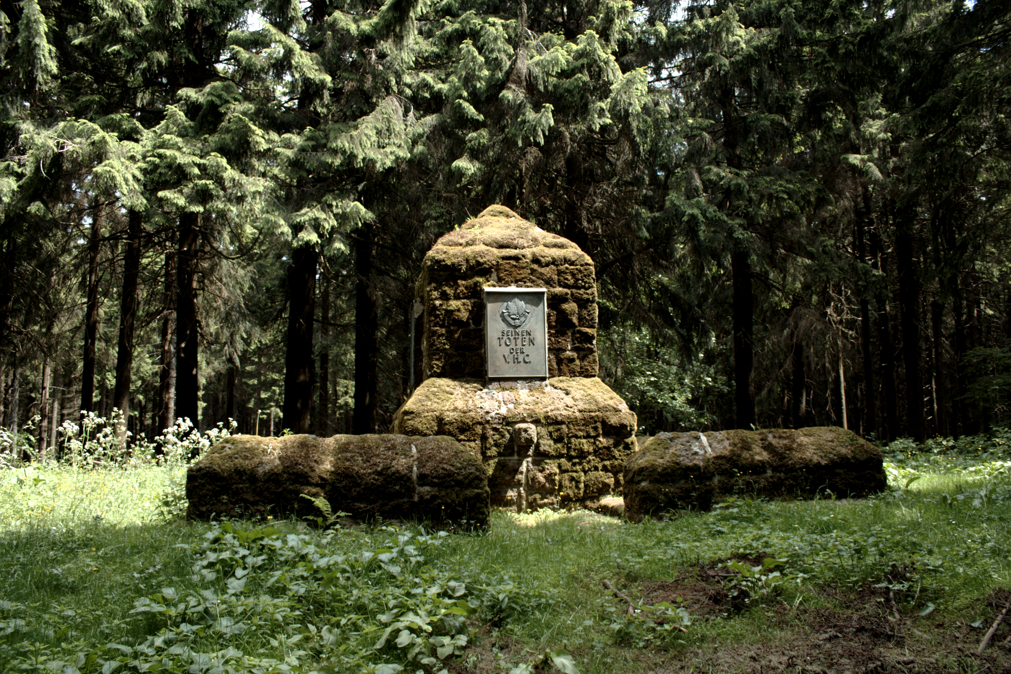 VHC (Vogelsberger Höhen-Club) Denkmal Herchenhain-Hartmannshain / 1926